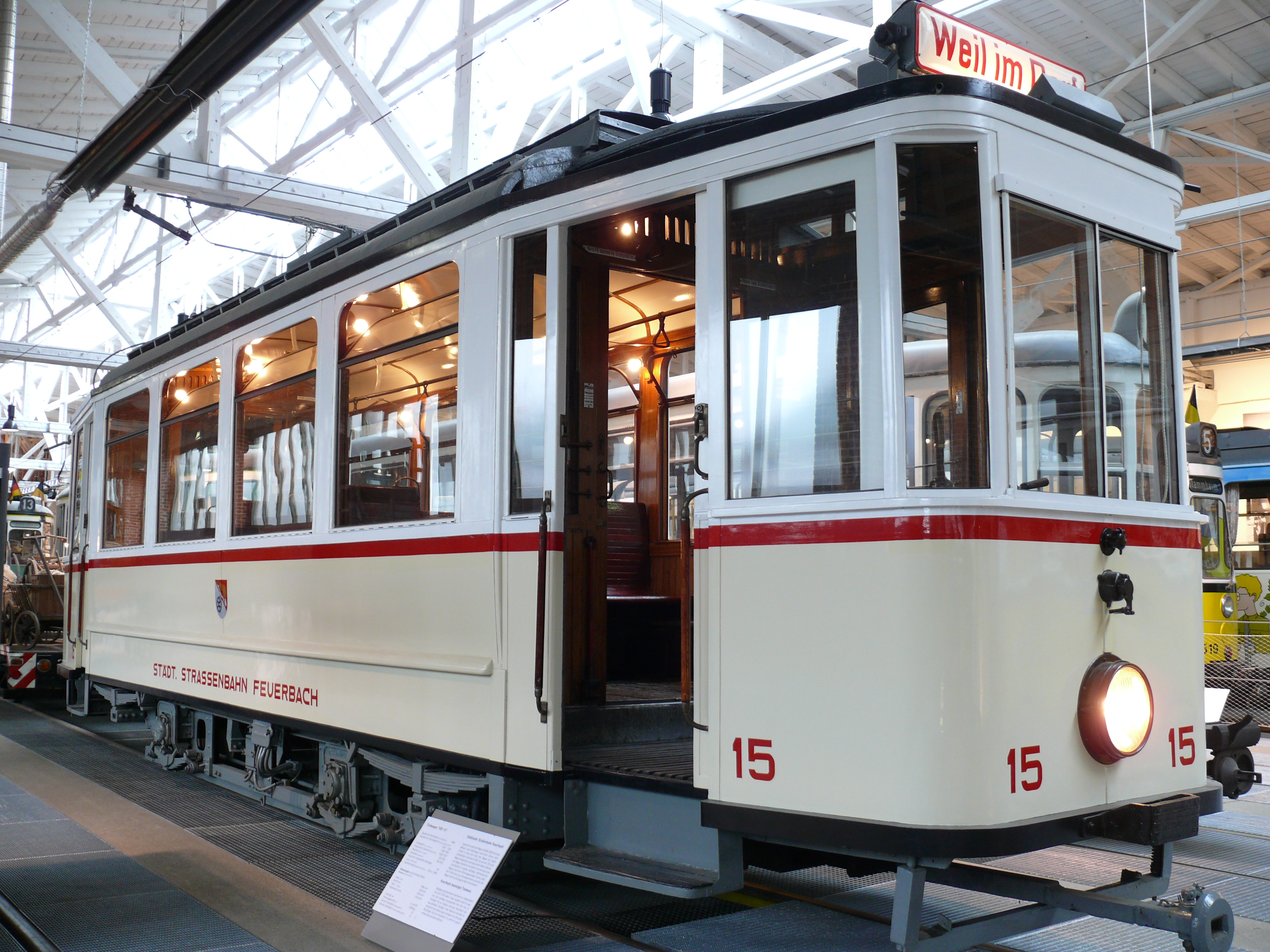 Triebwagen 15 der ""Städtischen Straßenbahn Feuerbach" (SSF) im Stuttgarter Straßenbahnmuseum. Eigentlich handelt es sich hier um den Triebwagen 259 der SSB. Dieser wurde durch Umbau an jene aus Feuerbach dazumal angepasst, da keine Wagen der SSF übrig blieben.